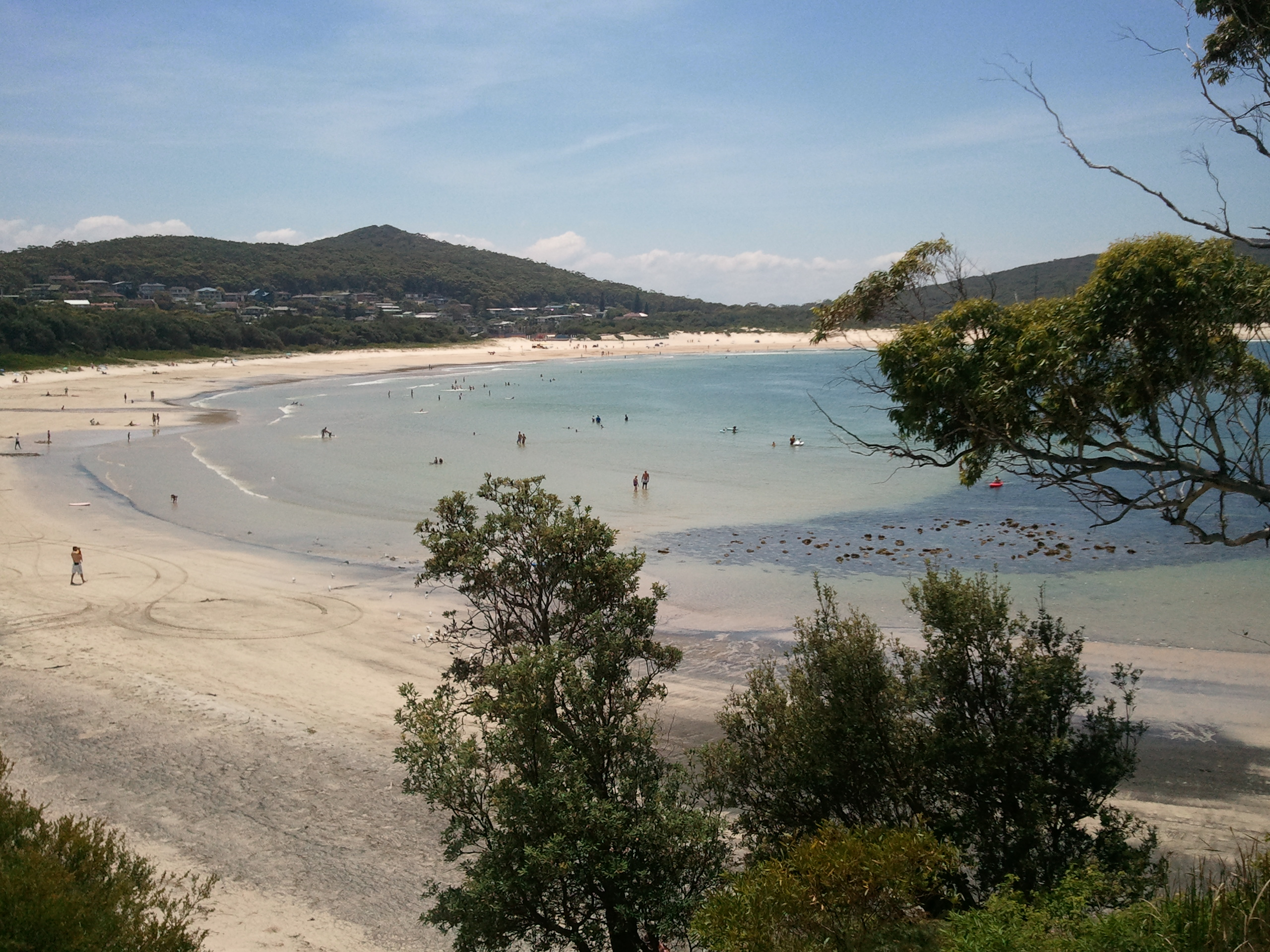 Fingal Bay